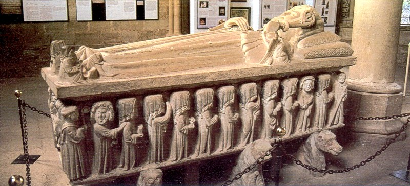 Date du cliché : septembre 2001.